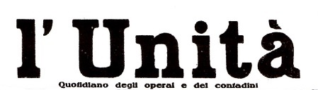 Mio lavoro basato su quest'immagine [1] Logo dell'Unità nel 1924-1925